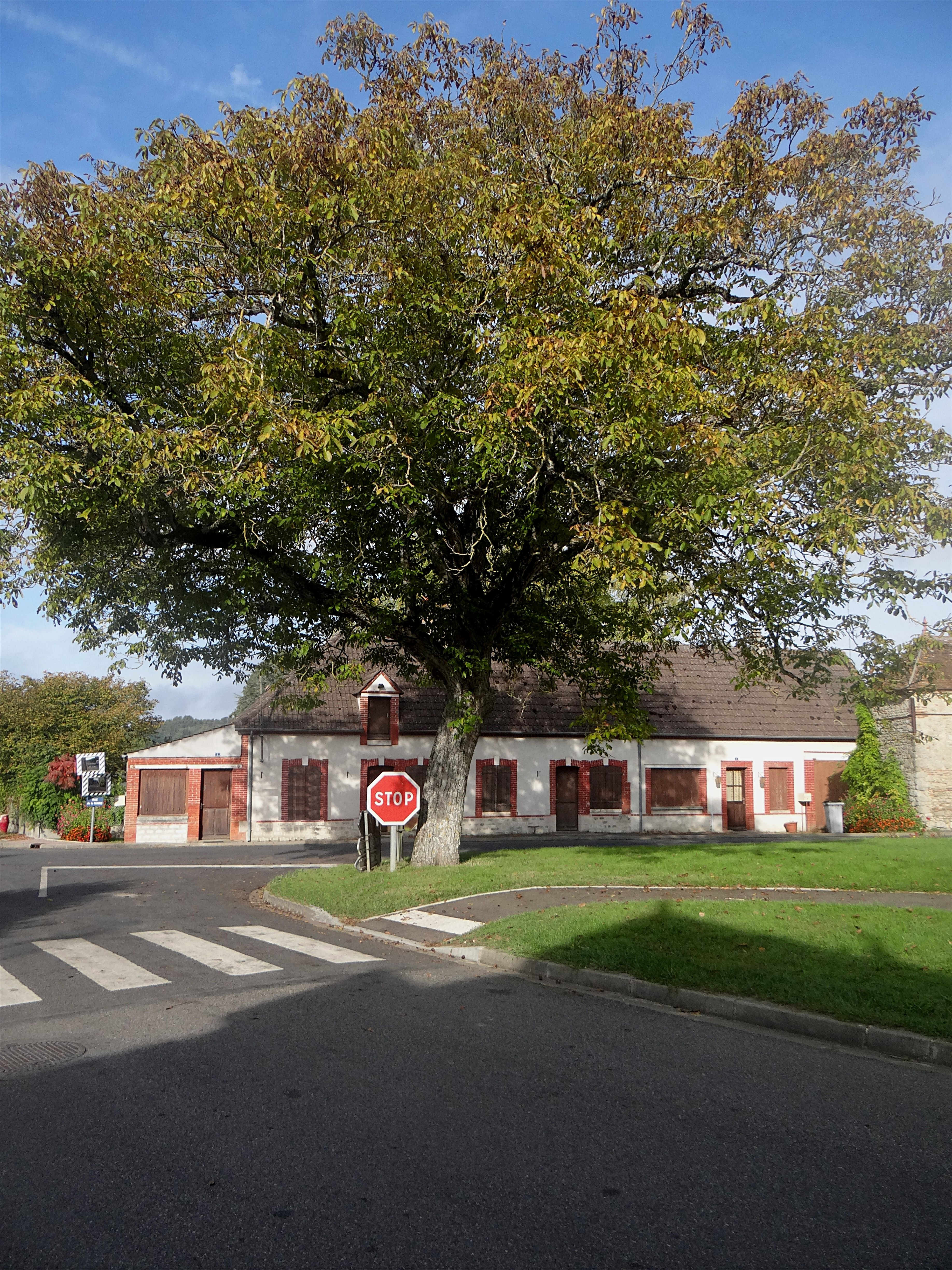 Noyer à l'angle de la rue de la Mairie et des Genièvres, Noyers, Loiret, France.